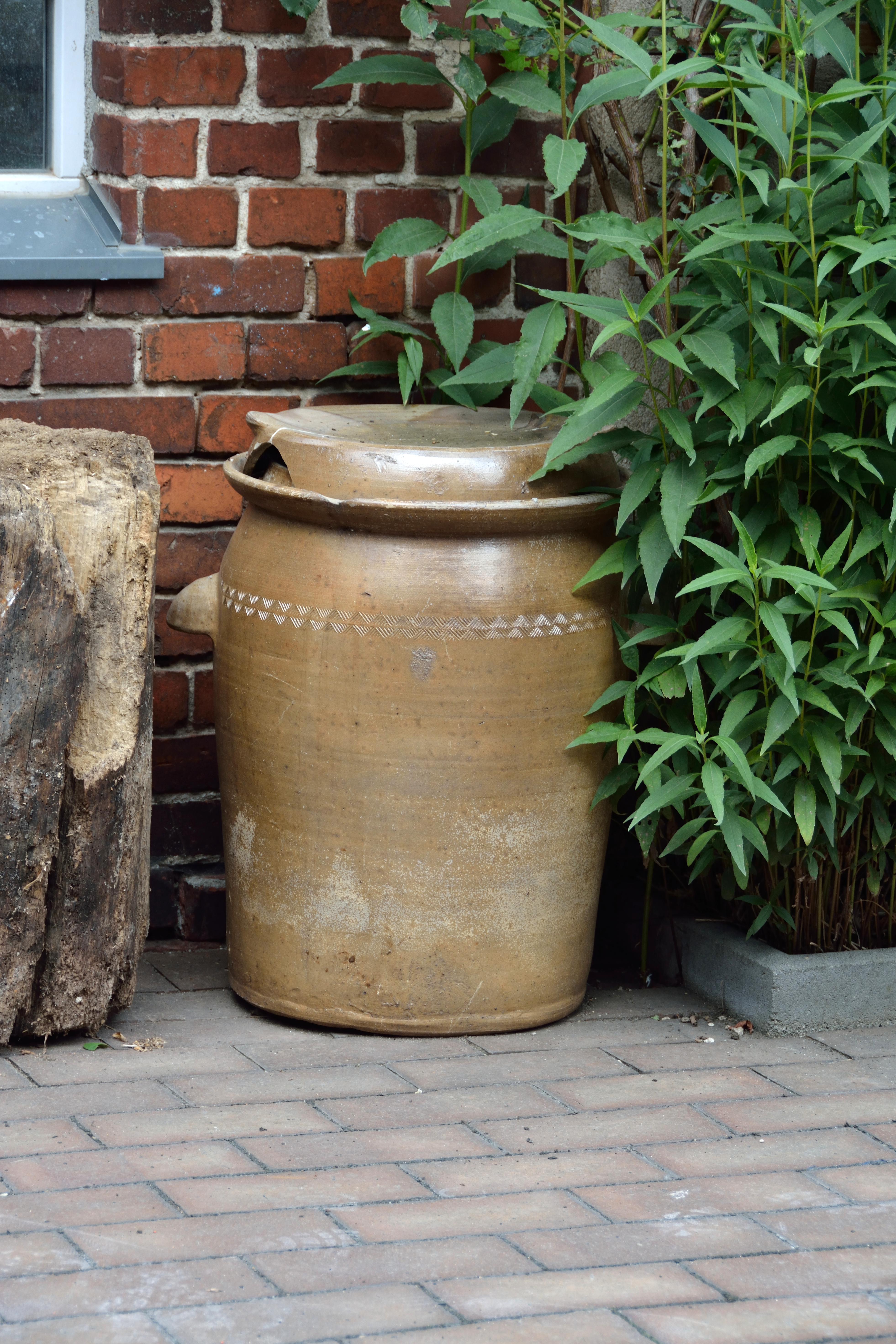 Impressionen der "Alten Mühle" in Proschim. Dies ist ein Museum, das die alte bäuerliche Kultur der Gegend bewahrt und für Besucher zugänglich macht. Weitere Ausstellungsräume befinden sich zur Zeit (2015) im Aufbau. Zum Museum gehört auch eine Traktorenausstellung, die in dieser Bilderserie nicht berücksichtigt wird. TransLausitz 2015 um Boxberg/O.L. This photo was taken during the project transLAUSITZ in August 2015. More mediafiles of that project are provided within the category transLAUSITZ 2015. The making of this document was supported by the Community-Budget of Wikimedia Germany.